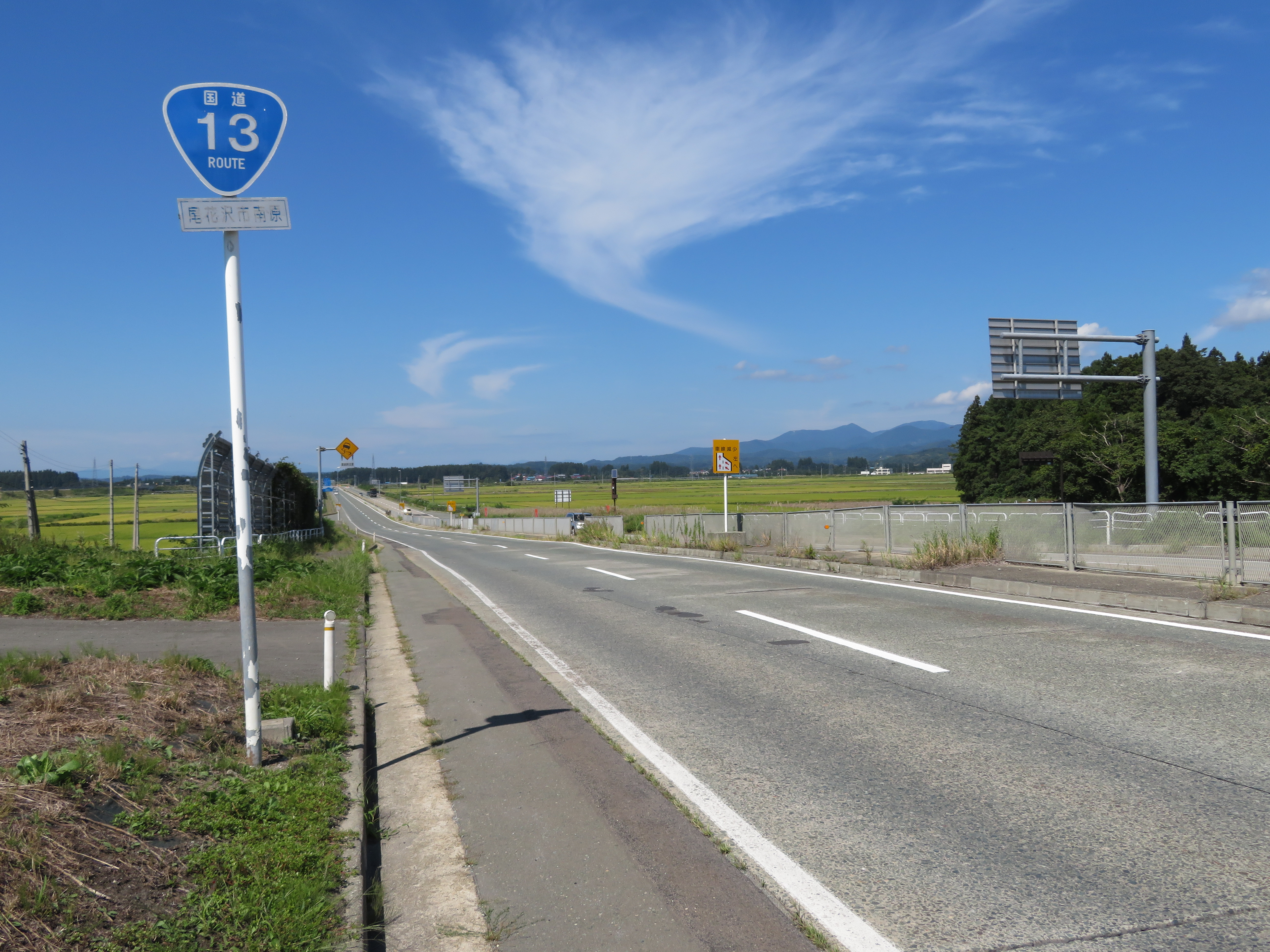 国道13号尾花沢バイパス山形県尾花沢市南原付近（新庄方面を撮影） Canon PowerShot SX720 HS